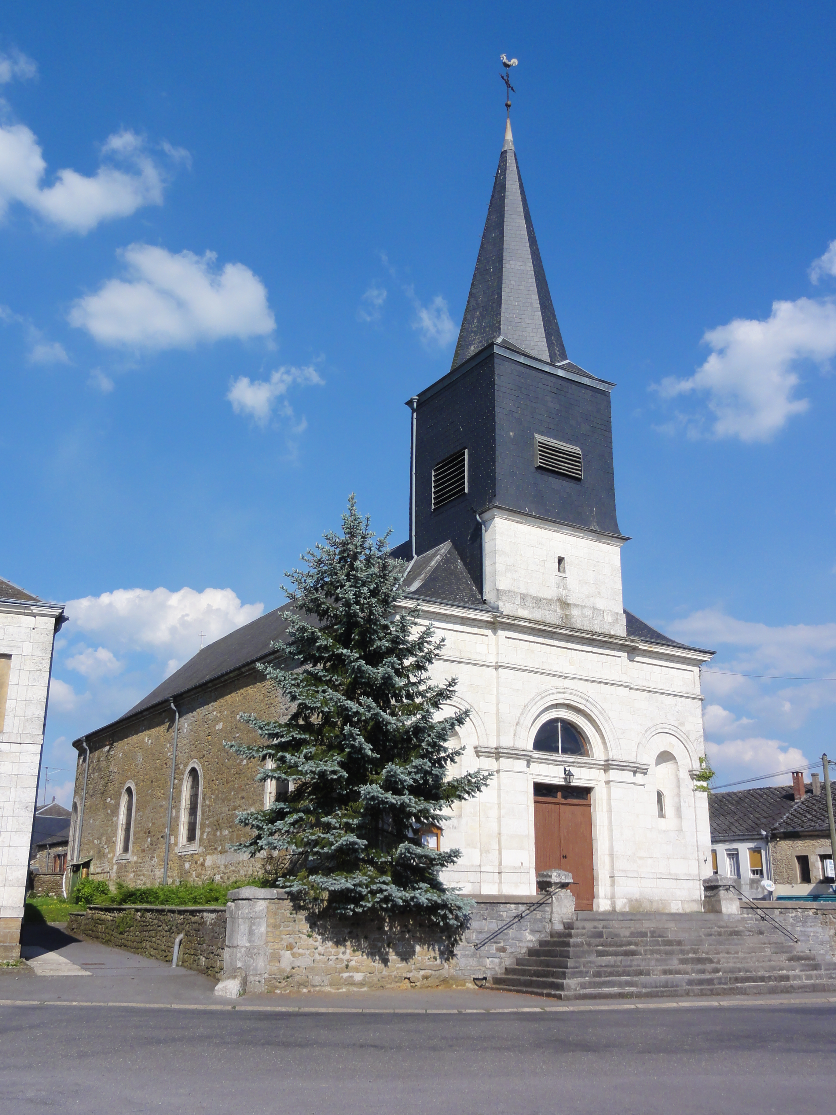 Auvillers-les-Forges (Ardennes) Église